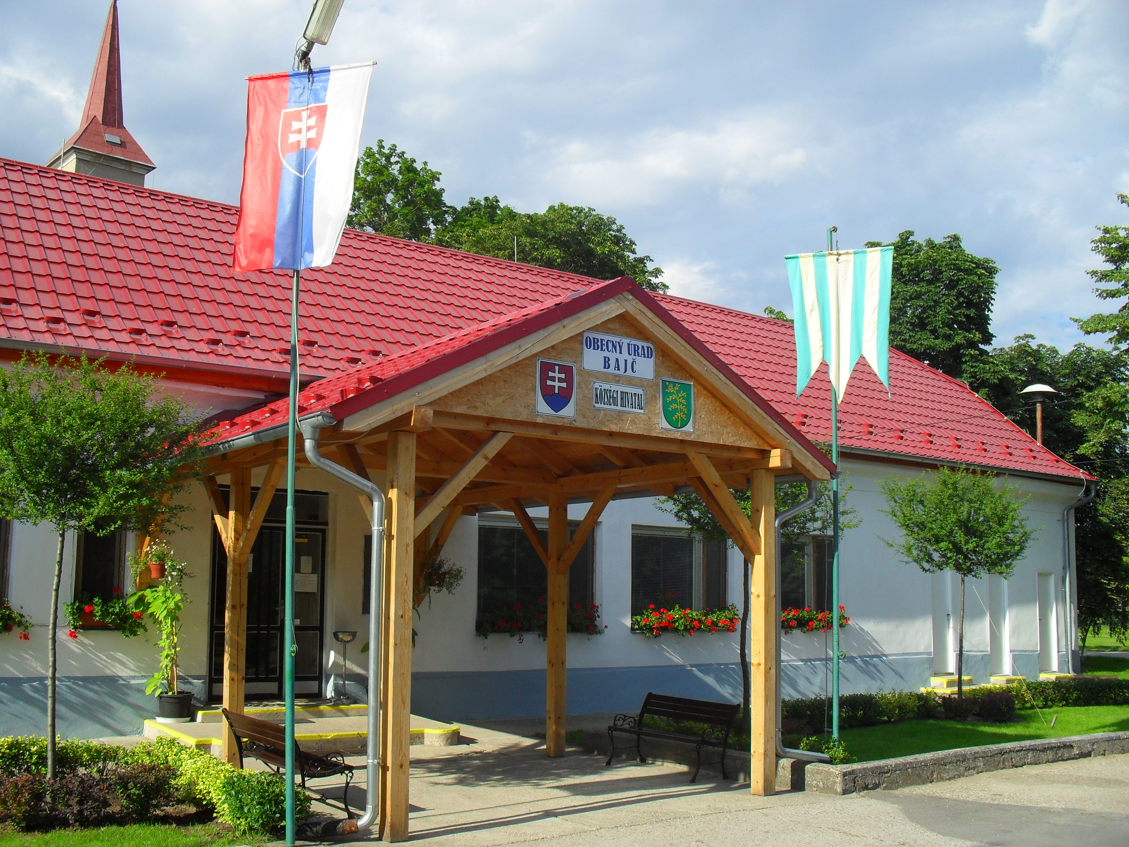 Bajcs - községi hivatal